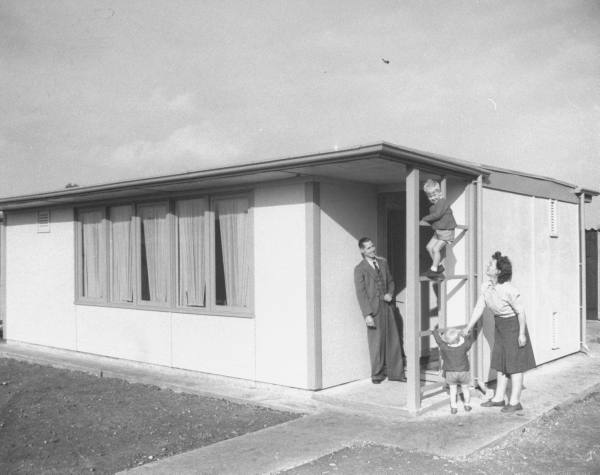 Une famille américaine recevant son UK100. Quelque 8.000 unités de ce modèle ont été installées en France à partir de 1945 dans les communes attestées suivantes : Varaville (Calvados) - Dunkerque-Rosendaël (Nord) - Le Havre (Seine-Maritime) - Lorient (Morbihan) - Saint-Nazaire (Loire-Atlantique).